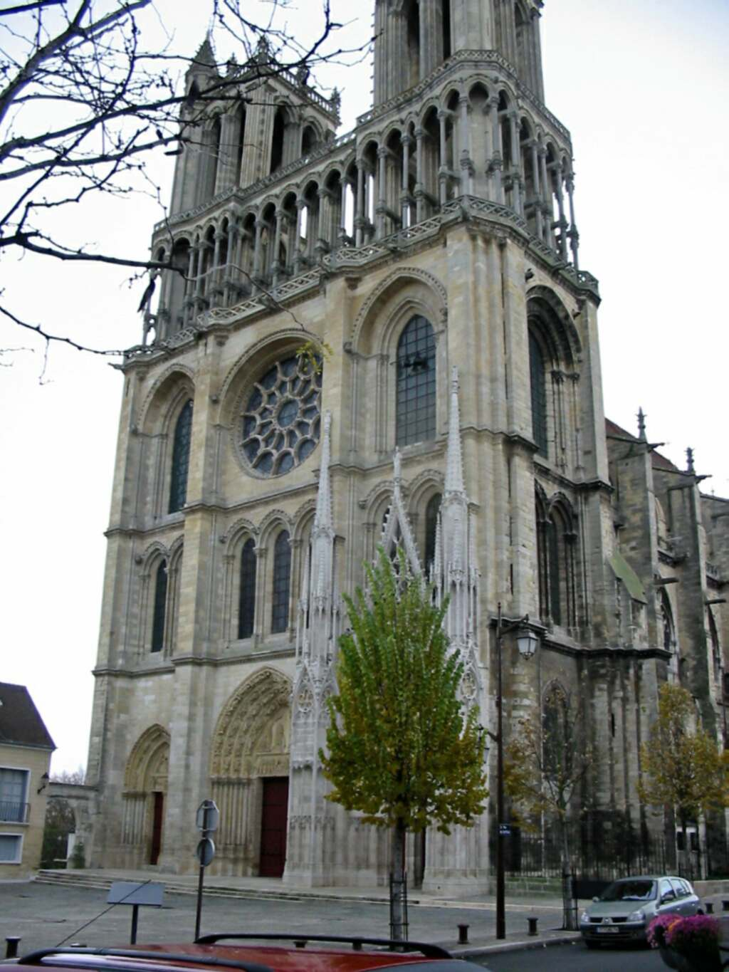 Collégiale de Mantes 110404 Photo JH Mora novembre 2004